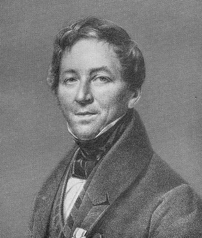 August Boeckh (1785–1867), deutscher Altertumswissenschaftler, mit dem Roten Adlerorden. Lithographie von Werner, nach der Natur gezeichnet von Prof. Franz Krüger.